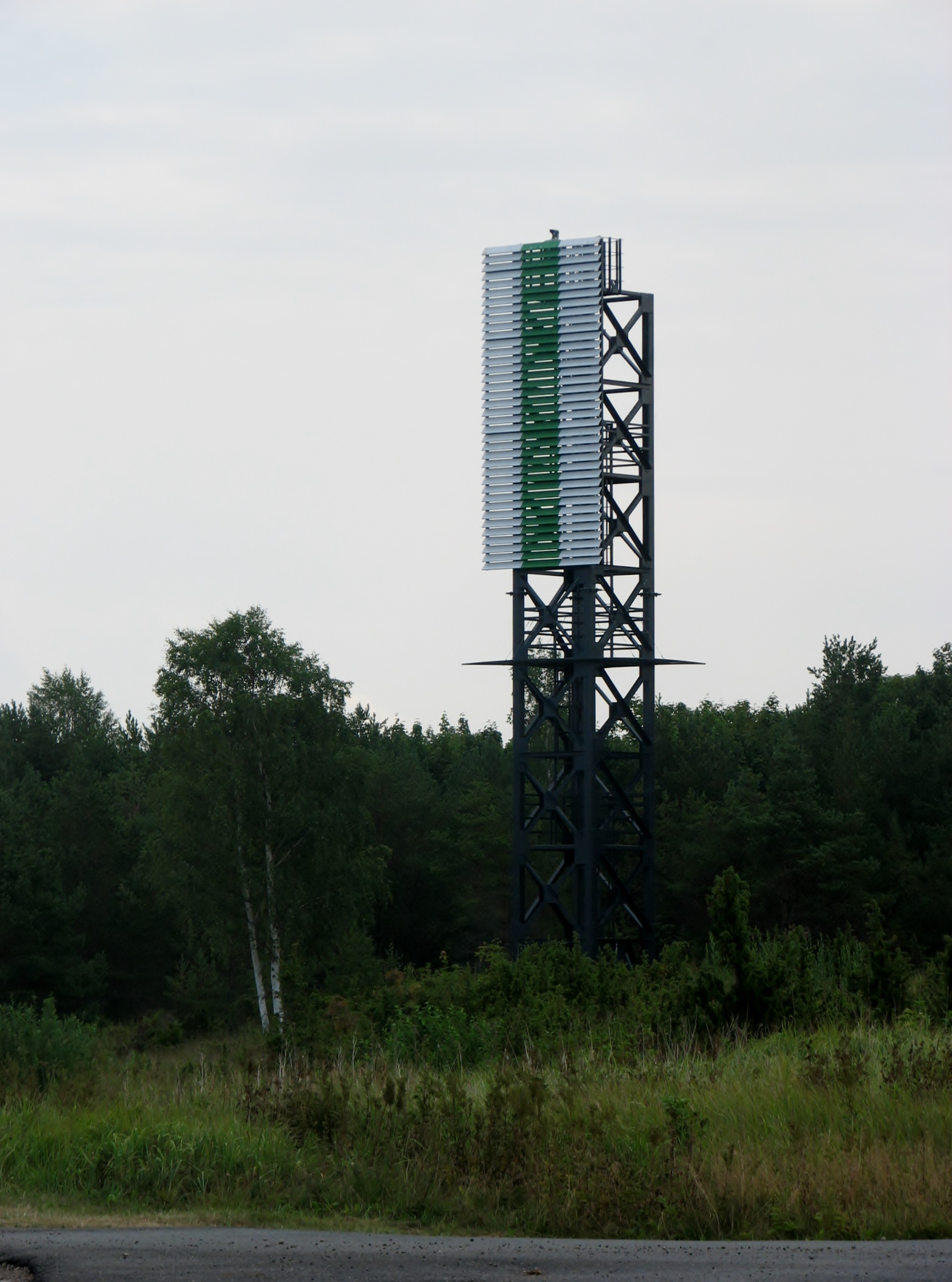 Kärdla alumine päevamärk